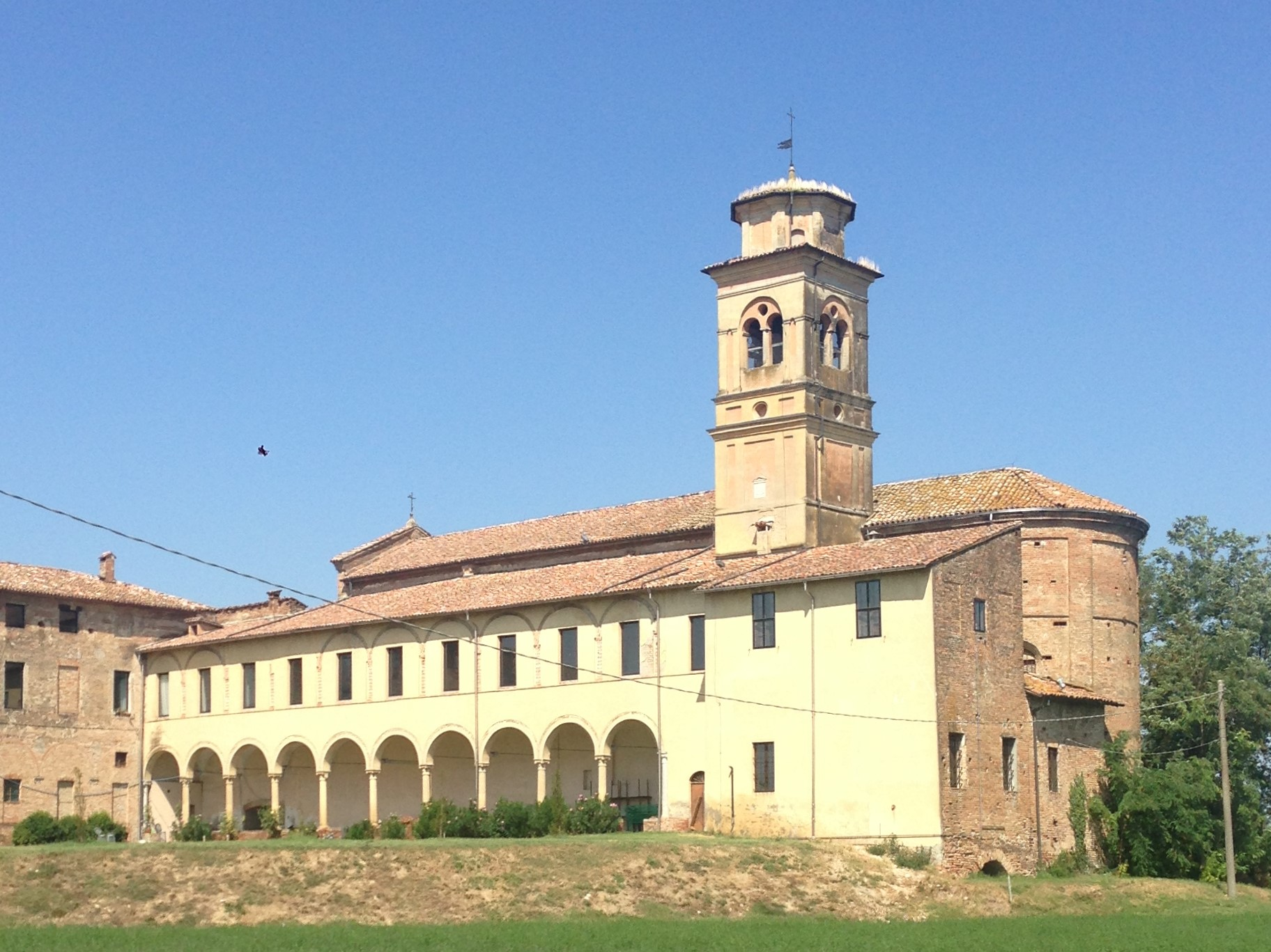 Iglesia rural entre Fiorenzuola d'Arda y Fidenza